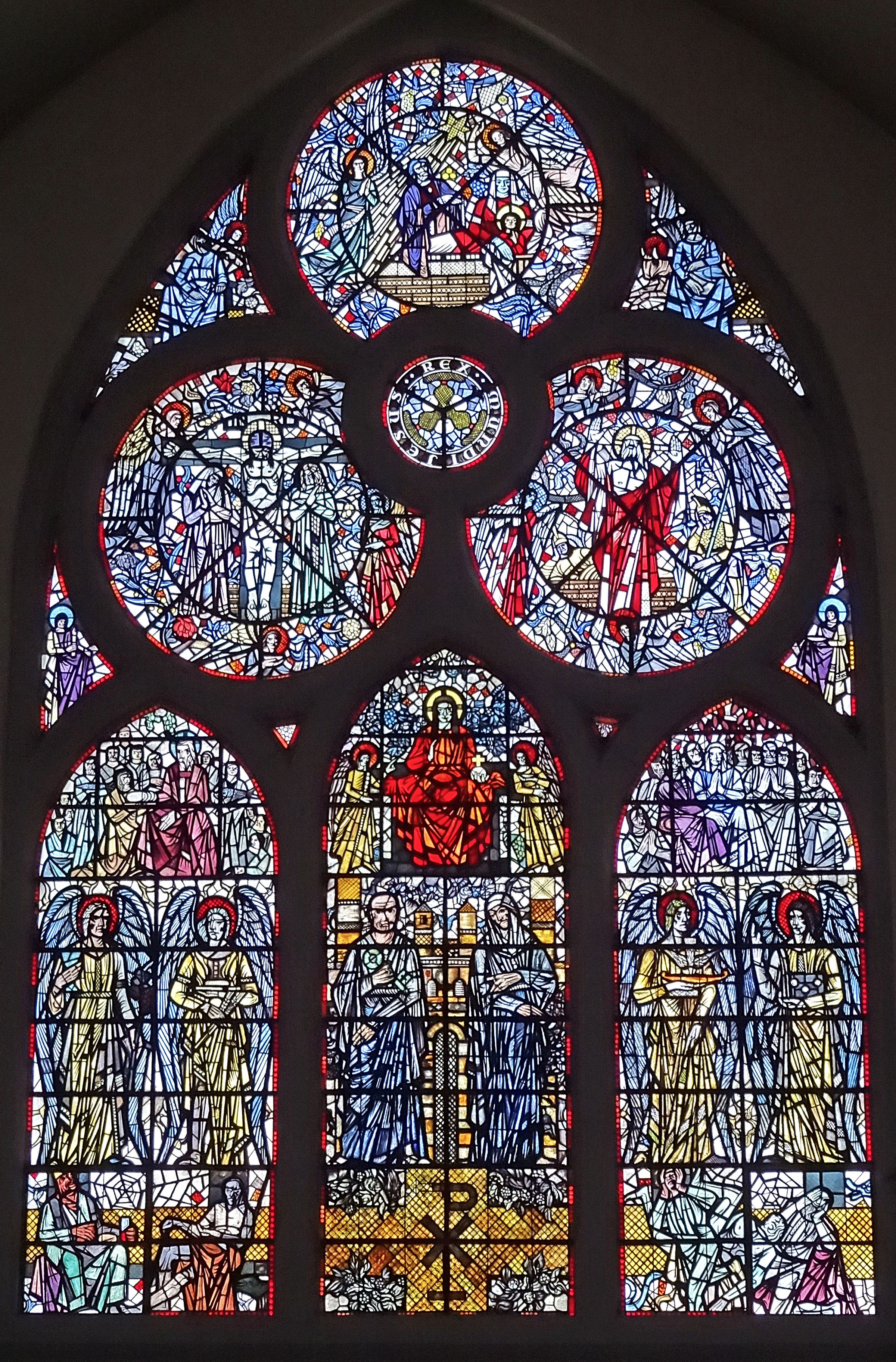 großes Ostfenster von Karl Völker in der Thomaskirche zu Erfurt